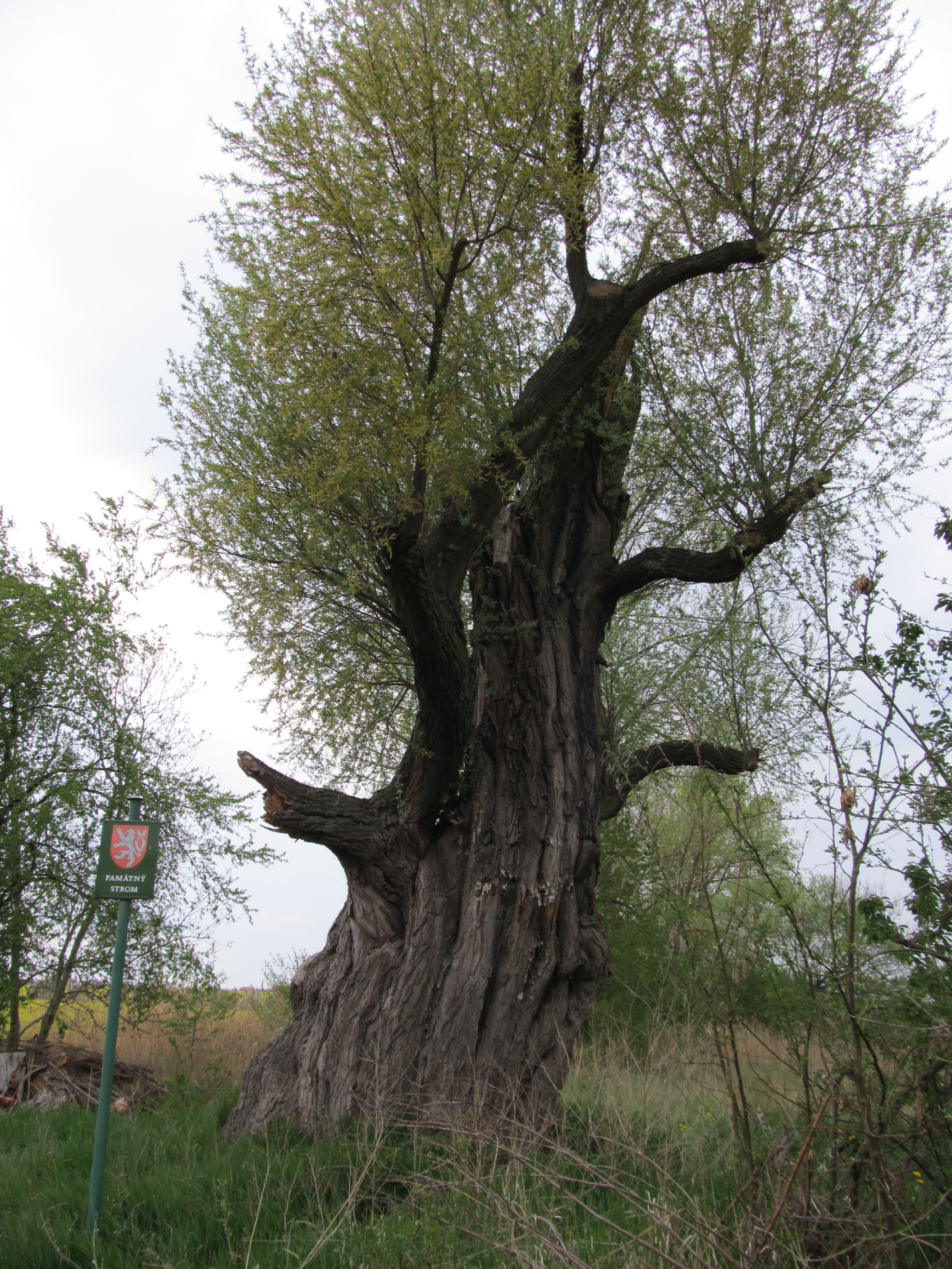 Tachlovická vrba - stav v roce 2019